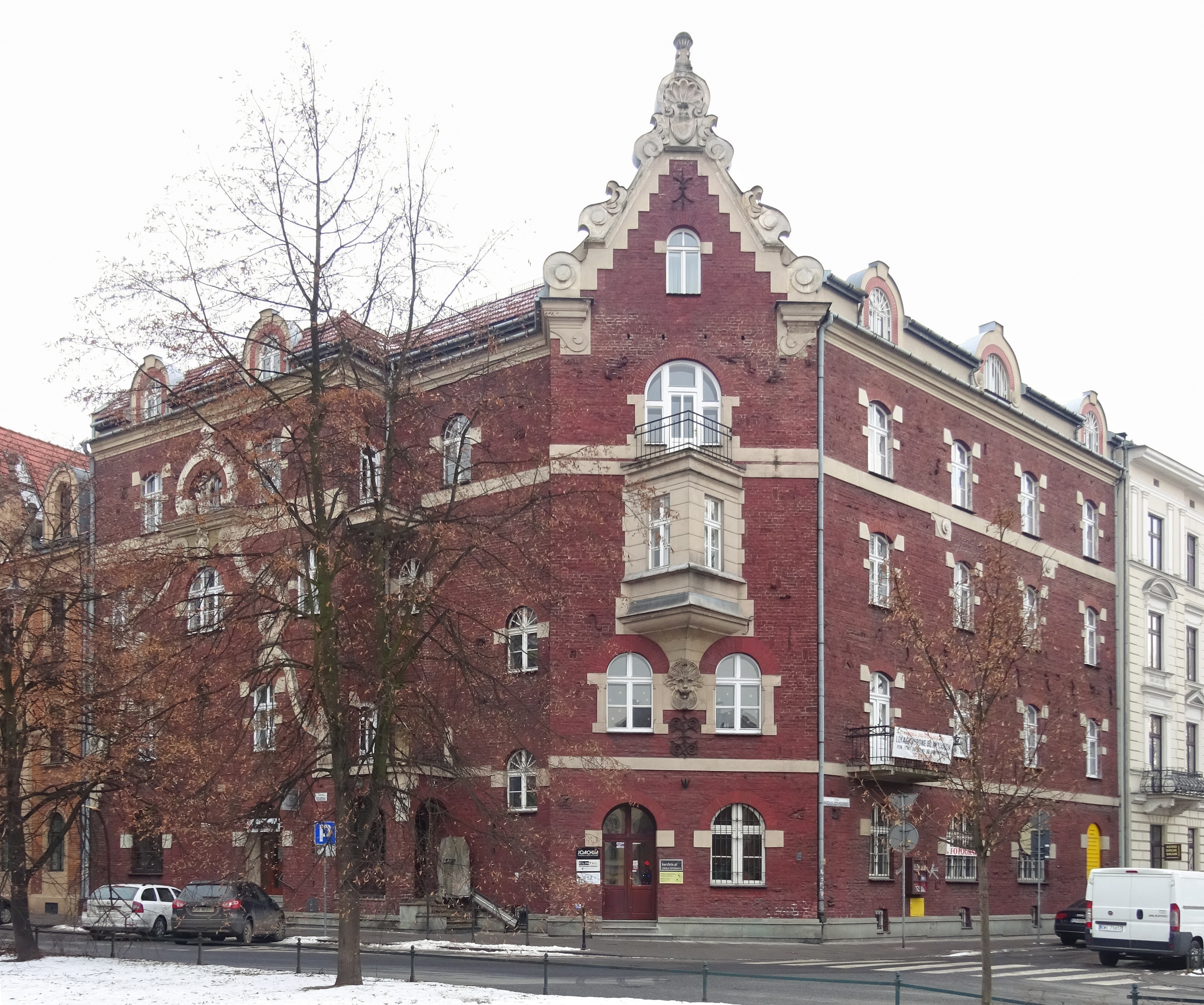 Kamienica pod Śpiewającą Żabą w Krakowie, przy ul. Retoryka 1.